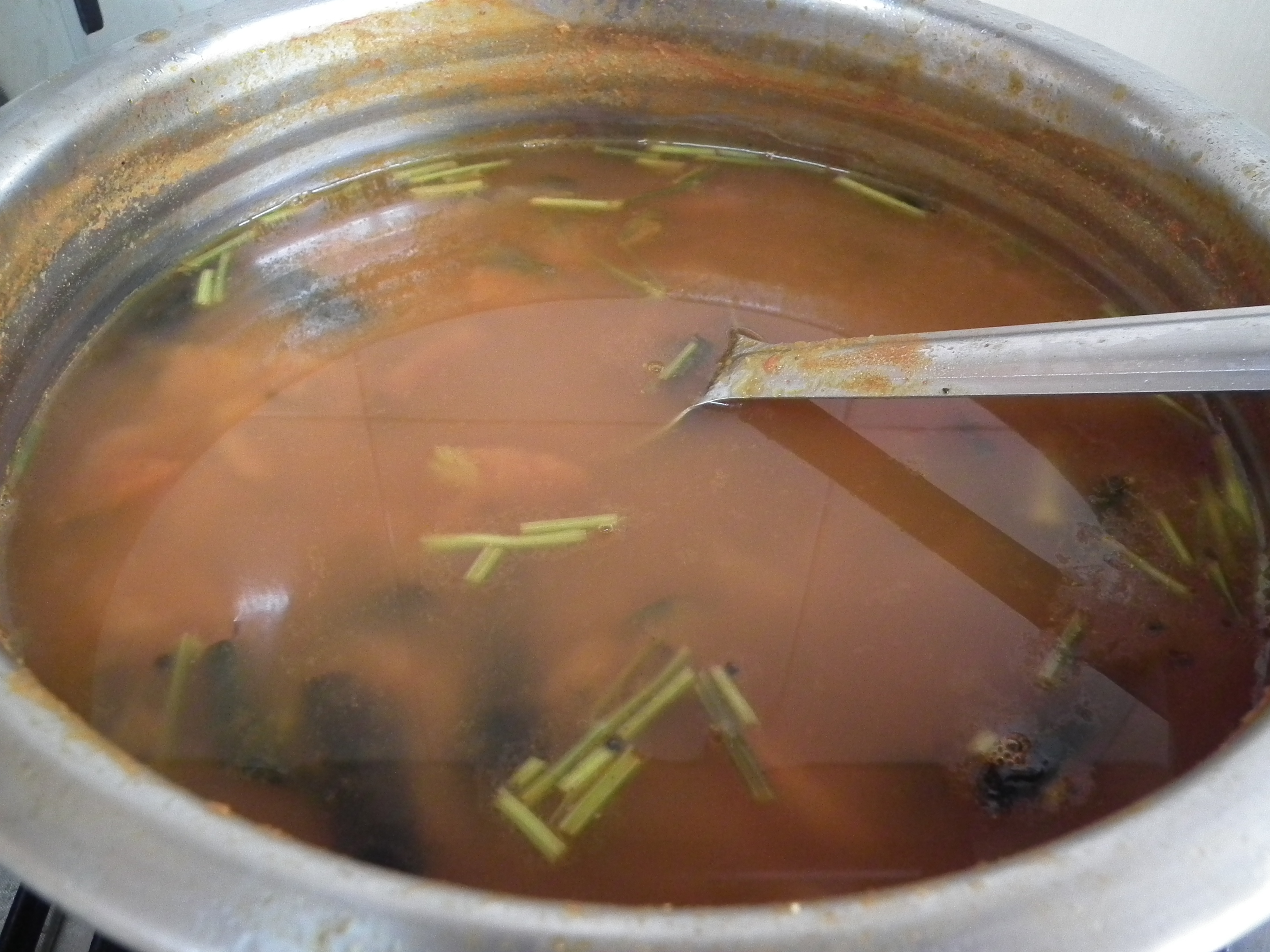 Rasam from Kerala